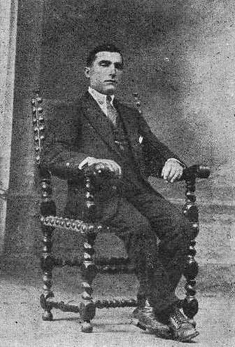 José Vázquez Grela, fotografía en Vida Gallega 1920